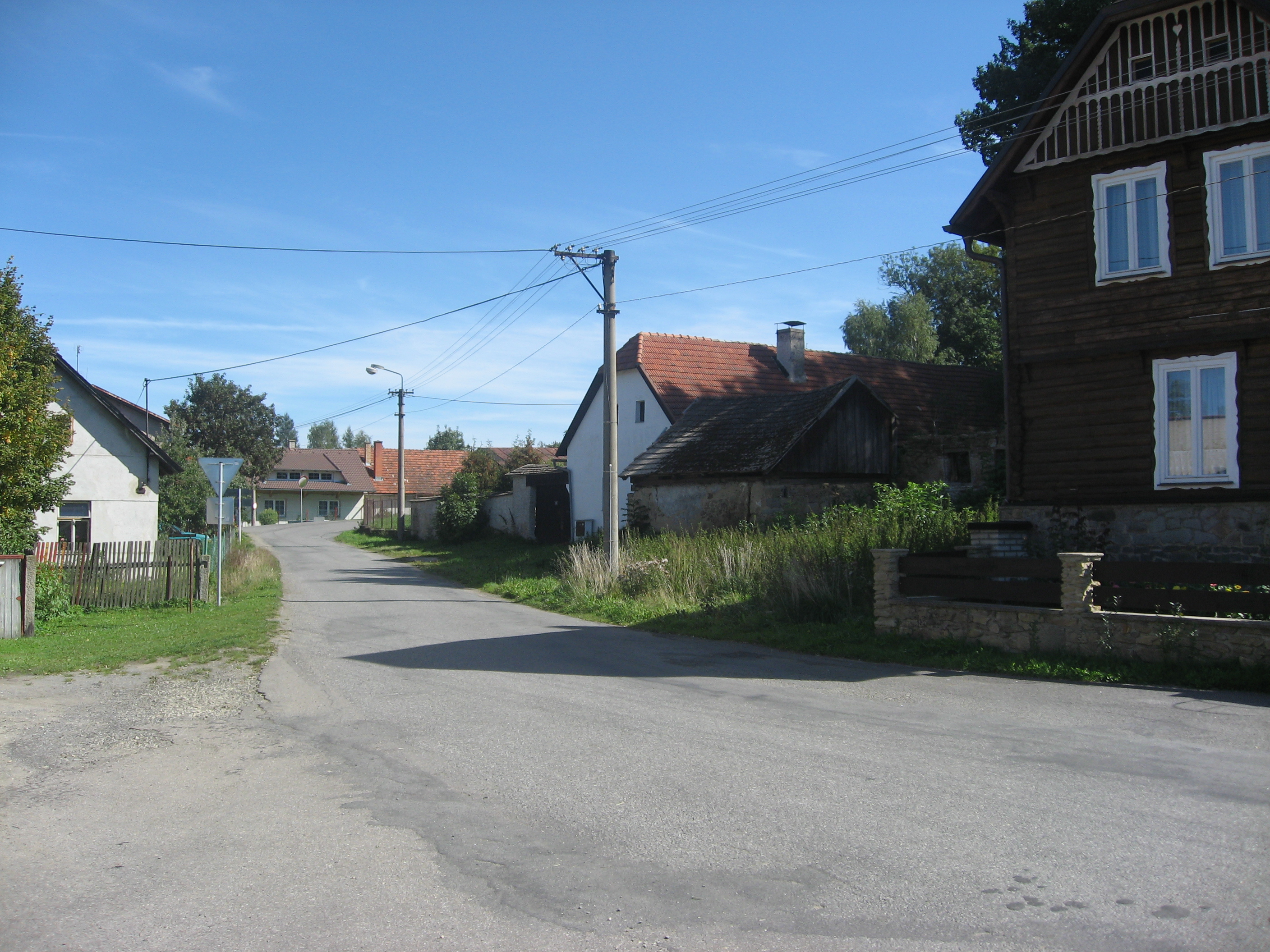 Kejžlice